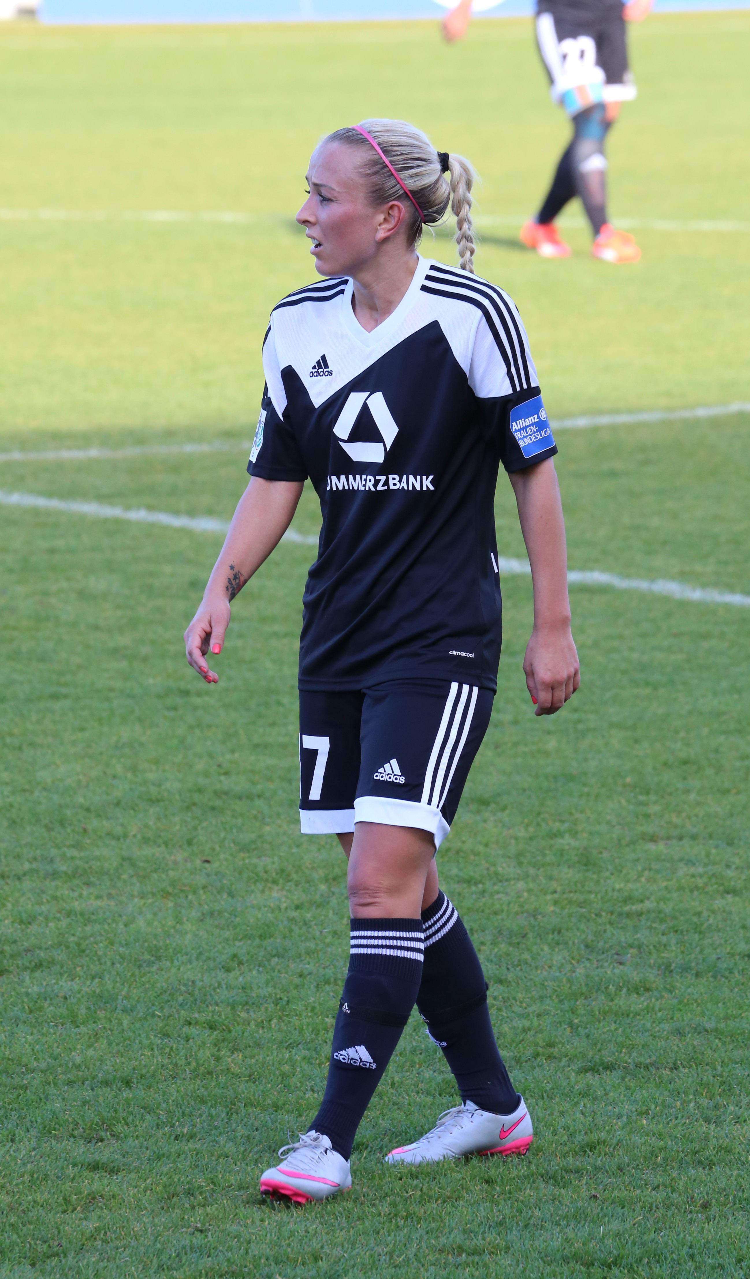 Mandy Islacker (1. FFC Frankfurt) im DFB-Pokal-Achtelfinale zwischen FC Bayern München und 1. FFC Frankfurt, Ergebnis 2:0, Stadion an der Grünwalder Straße